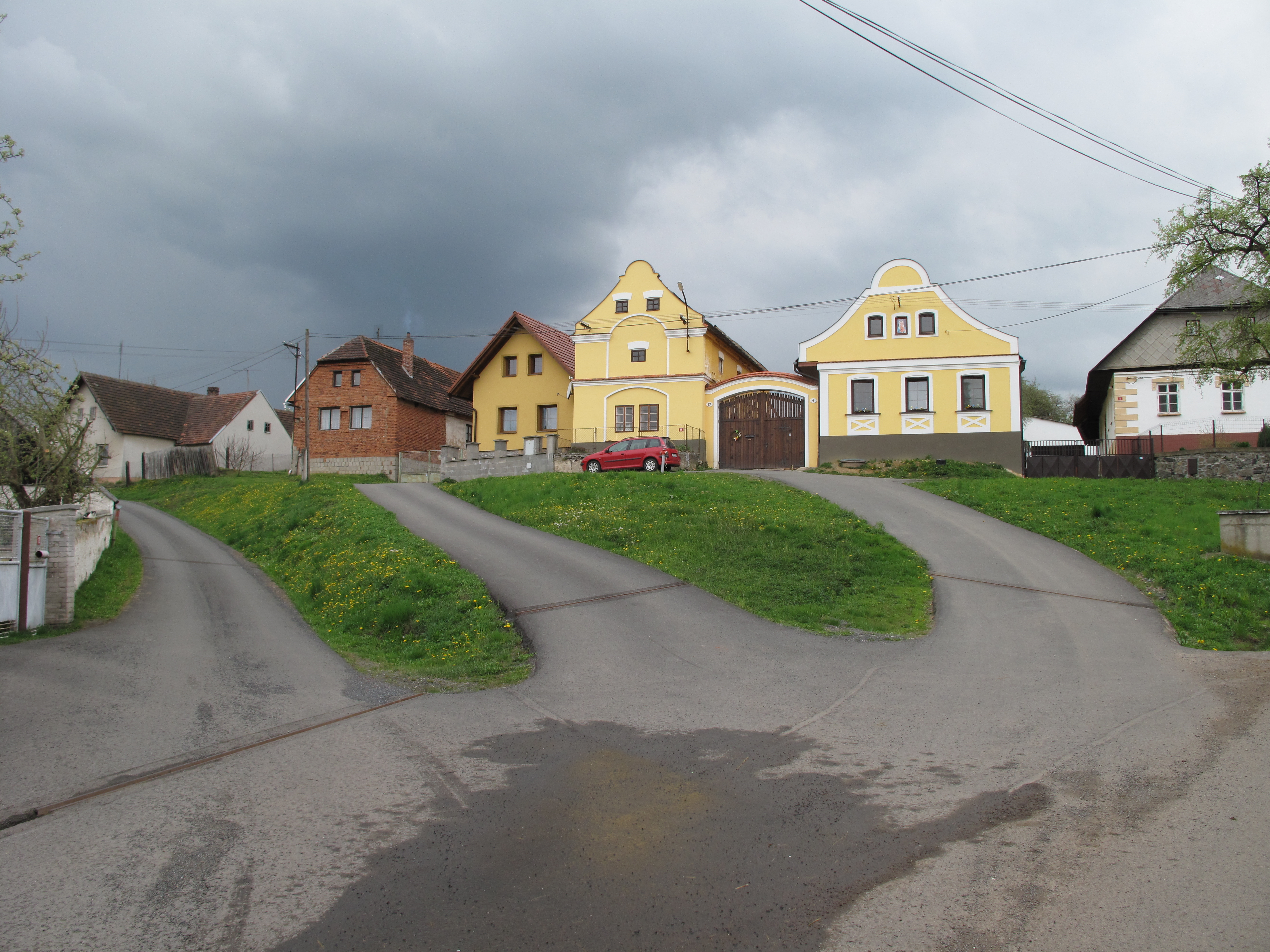 Poleňka. Okres Klatovy, Česká republika.